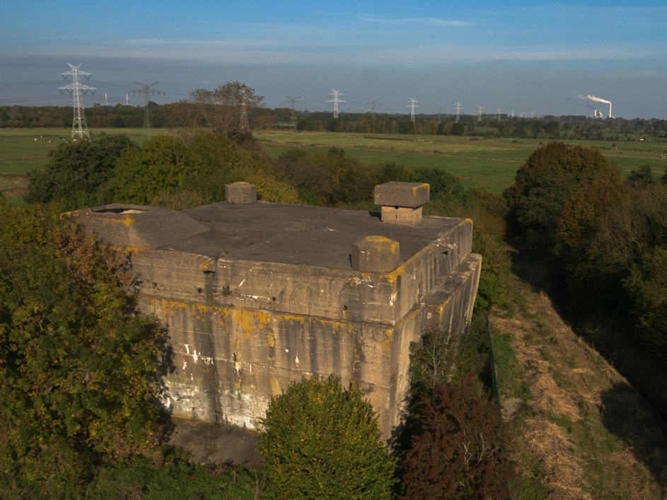 Luftschutzbunker "Accumer Bunker" an der Accumer Landstraße in Wilhelmshaven-Langewerth. Auch als T-1100 bekannt.